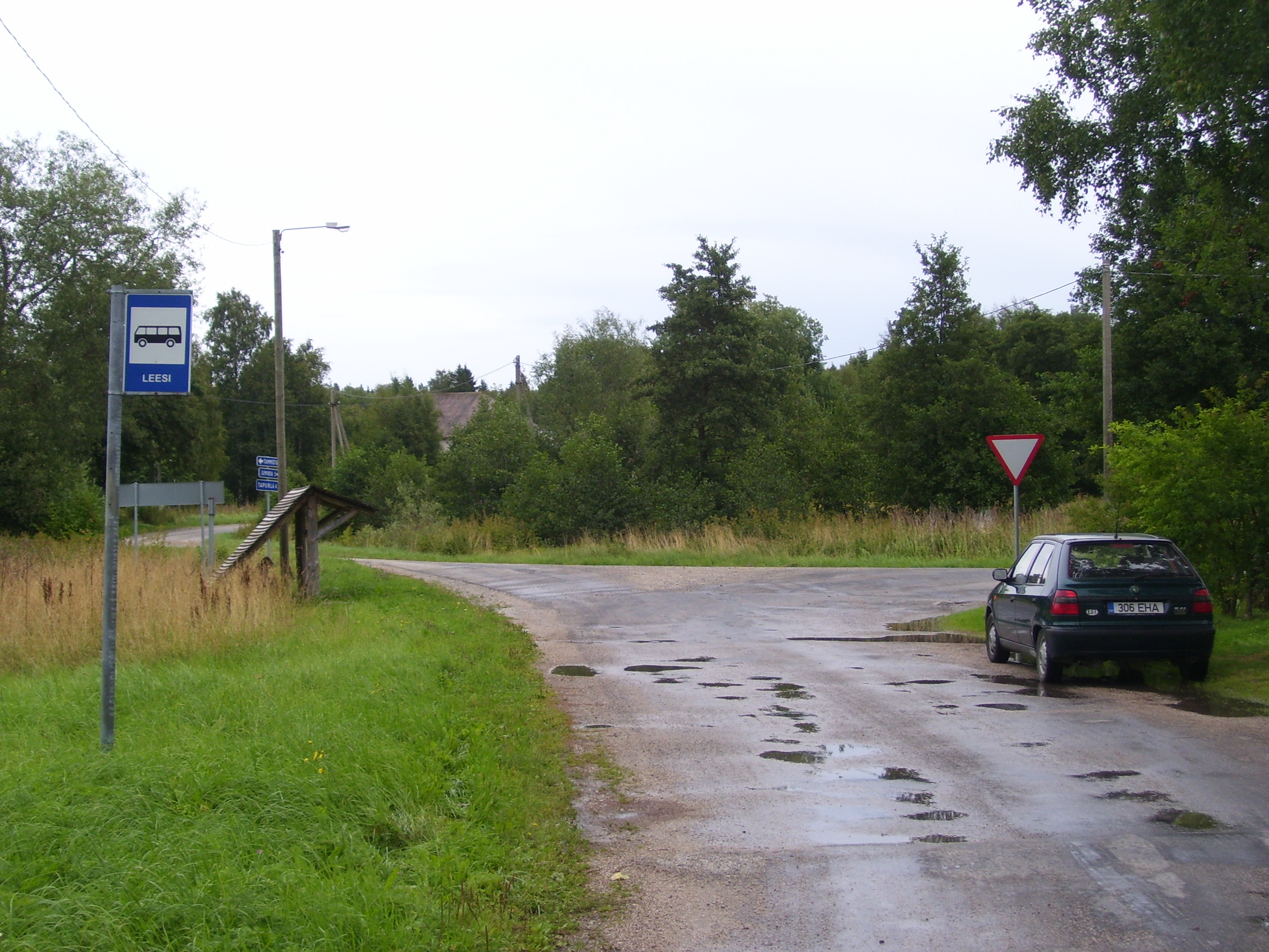 Leesi (Kuusalu vald), bussipeatus.